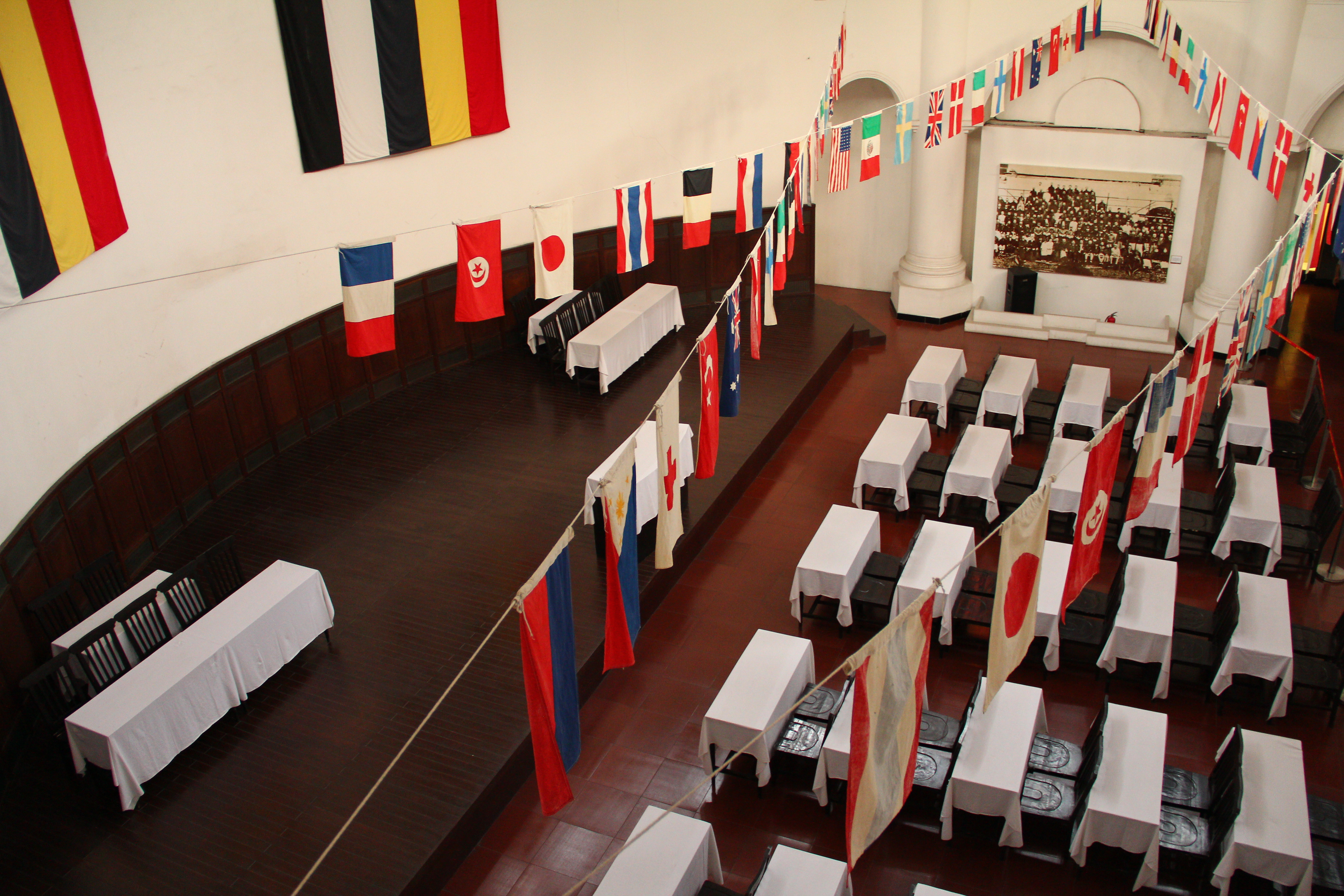 廣州近代史博物館百年風雲展覽，位於廣東諮議局舊址。復原1921年孫中山宣誓就任非常大總統時的禮場。